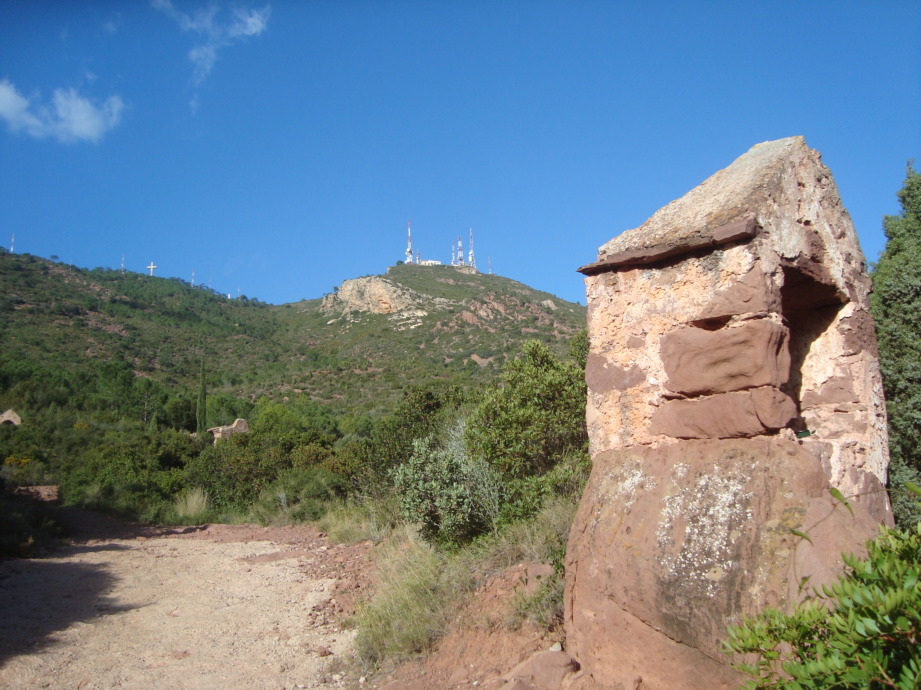 Calvari en la baixada de la carretera al Convent Vell (Benicàssim)